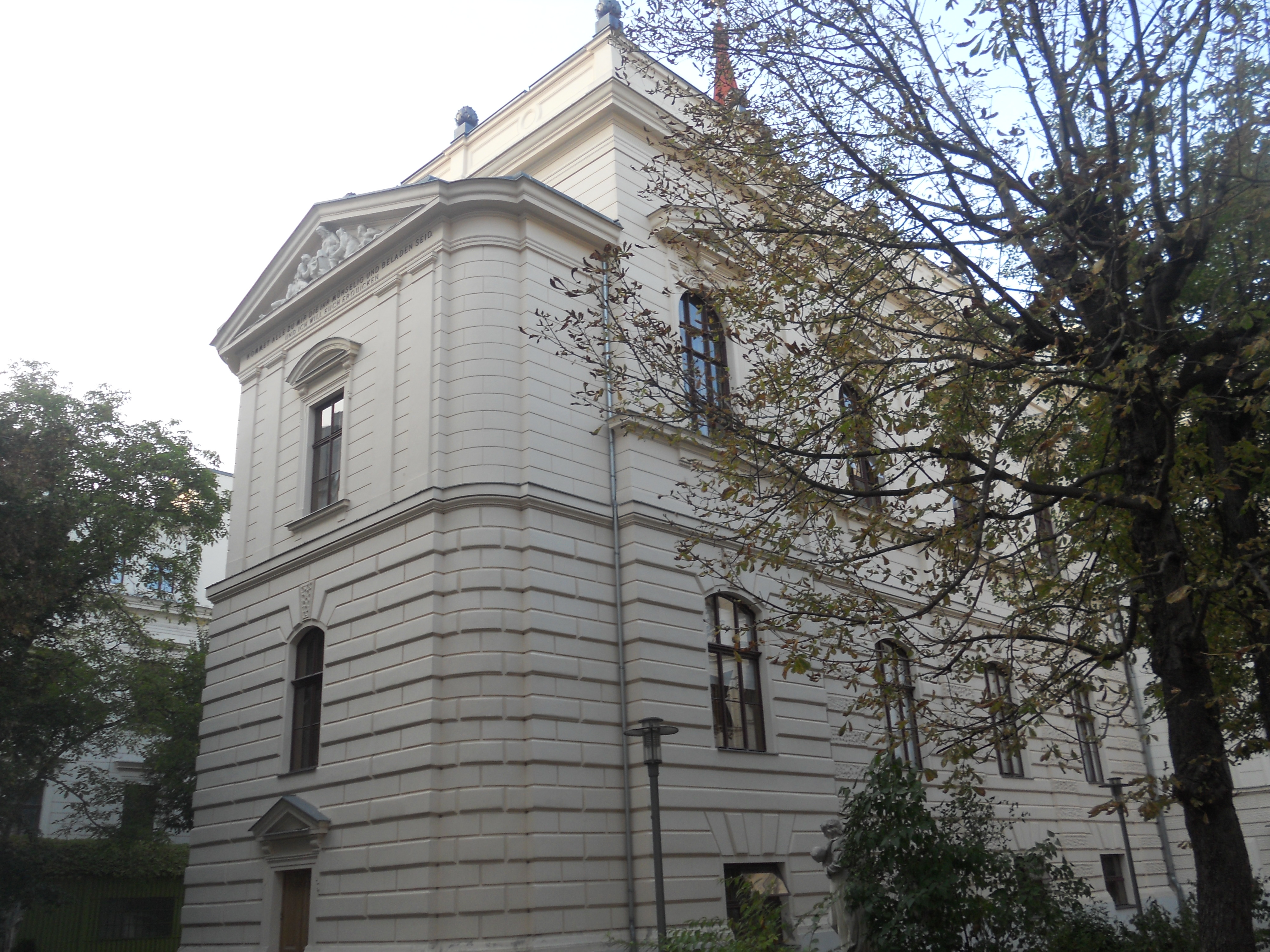 Hartmannspital, Wien Margareten Object location48° 11′ 18.9″ N, 16° 21′ 45.91″ E